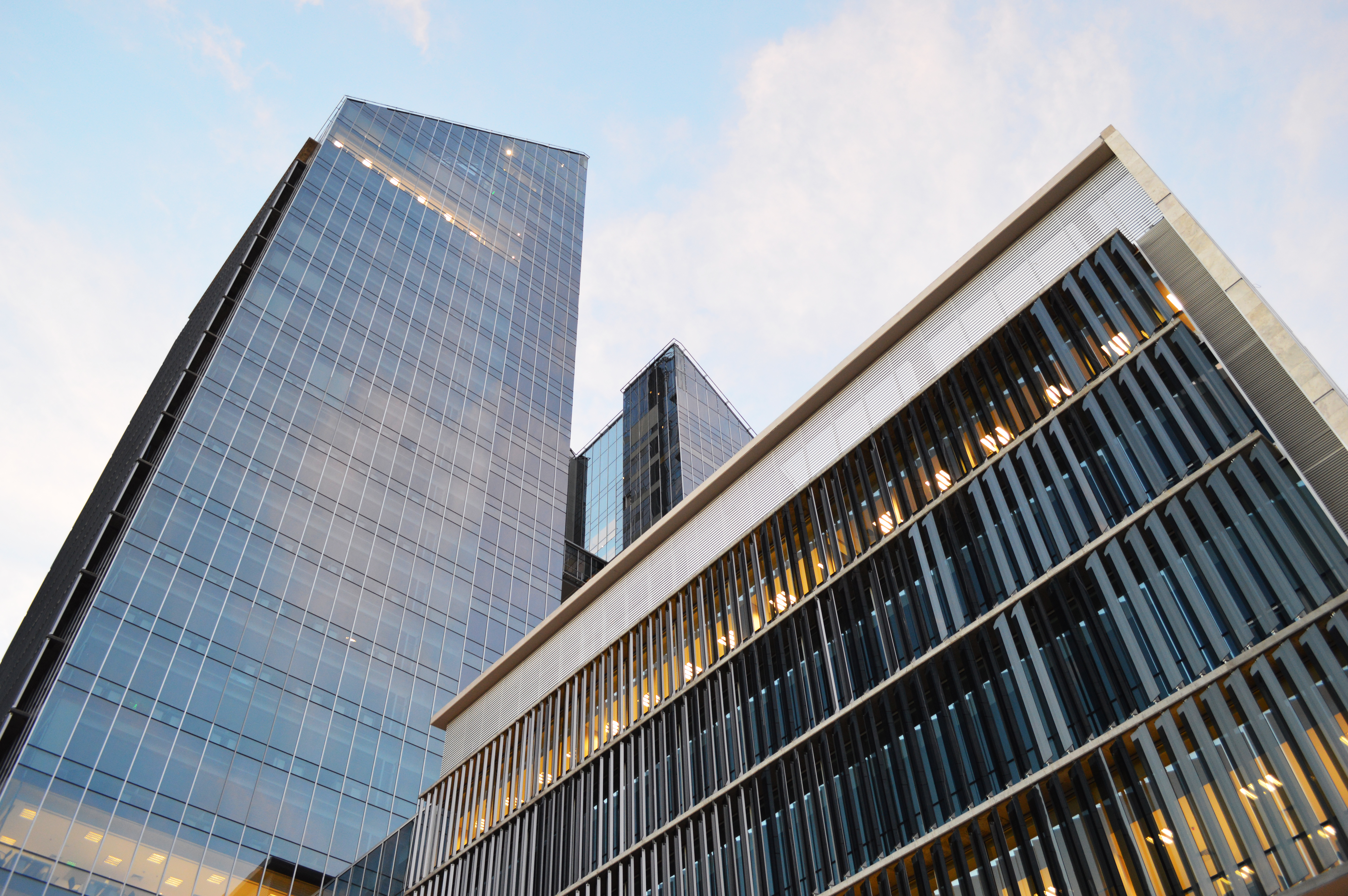 Vista del Complejo Juan Felipe Ibarra, de la ciudad de Santiago del Estero, Argentina.